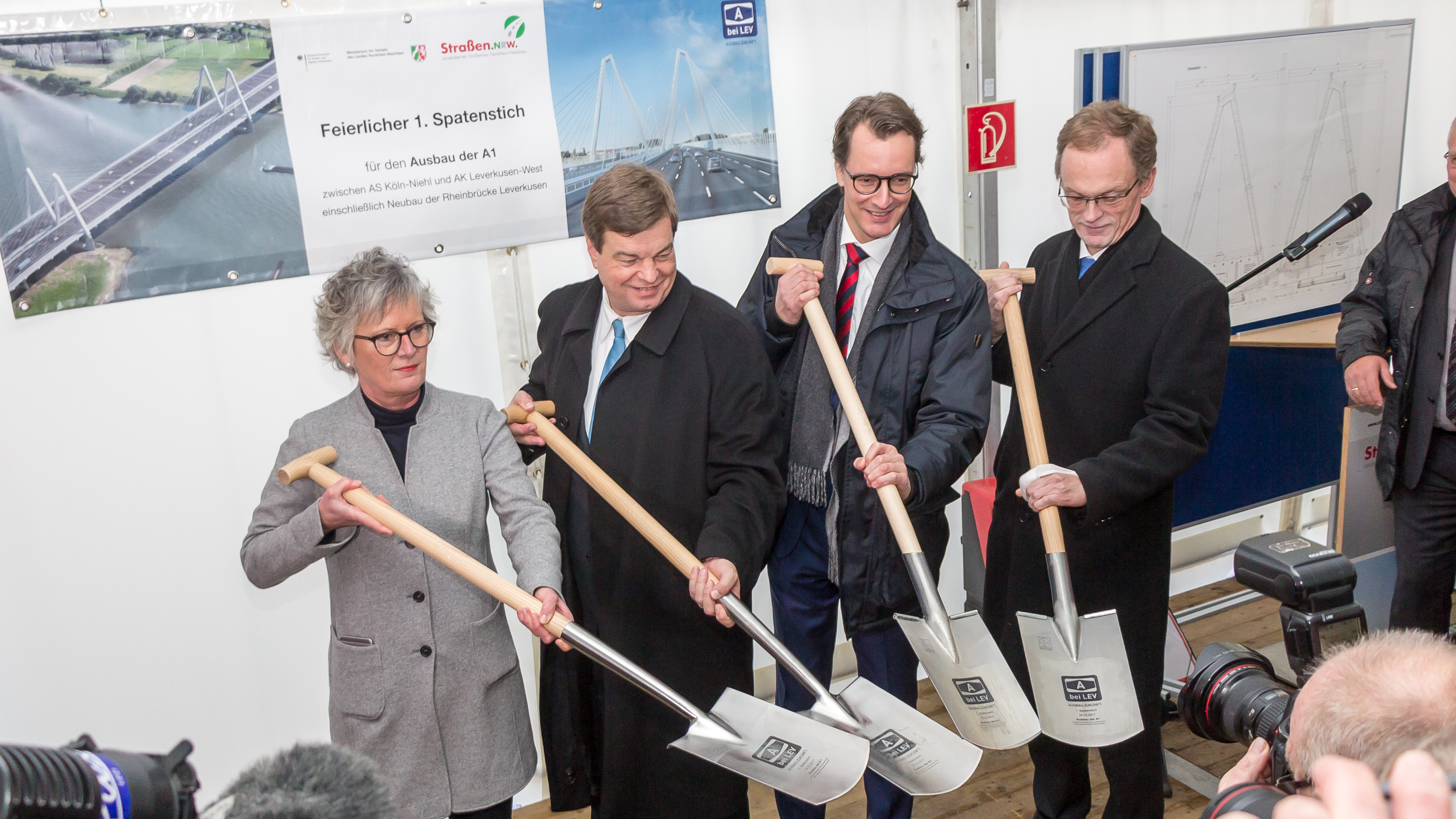 Spatenstich zum Neubau der Leverkusener Rheinbrücke Gruppenfoto mit symbolischen Spaten: Sauerwein-Braksiek (Straßen.NRW-Direktorin Elfriede), Enak Ferlemann (Parlamentarischer Staatssekretär beim Bundesverkehrsministerium), Hendrik Wüst (NRW-Verkehrsminister) und ?